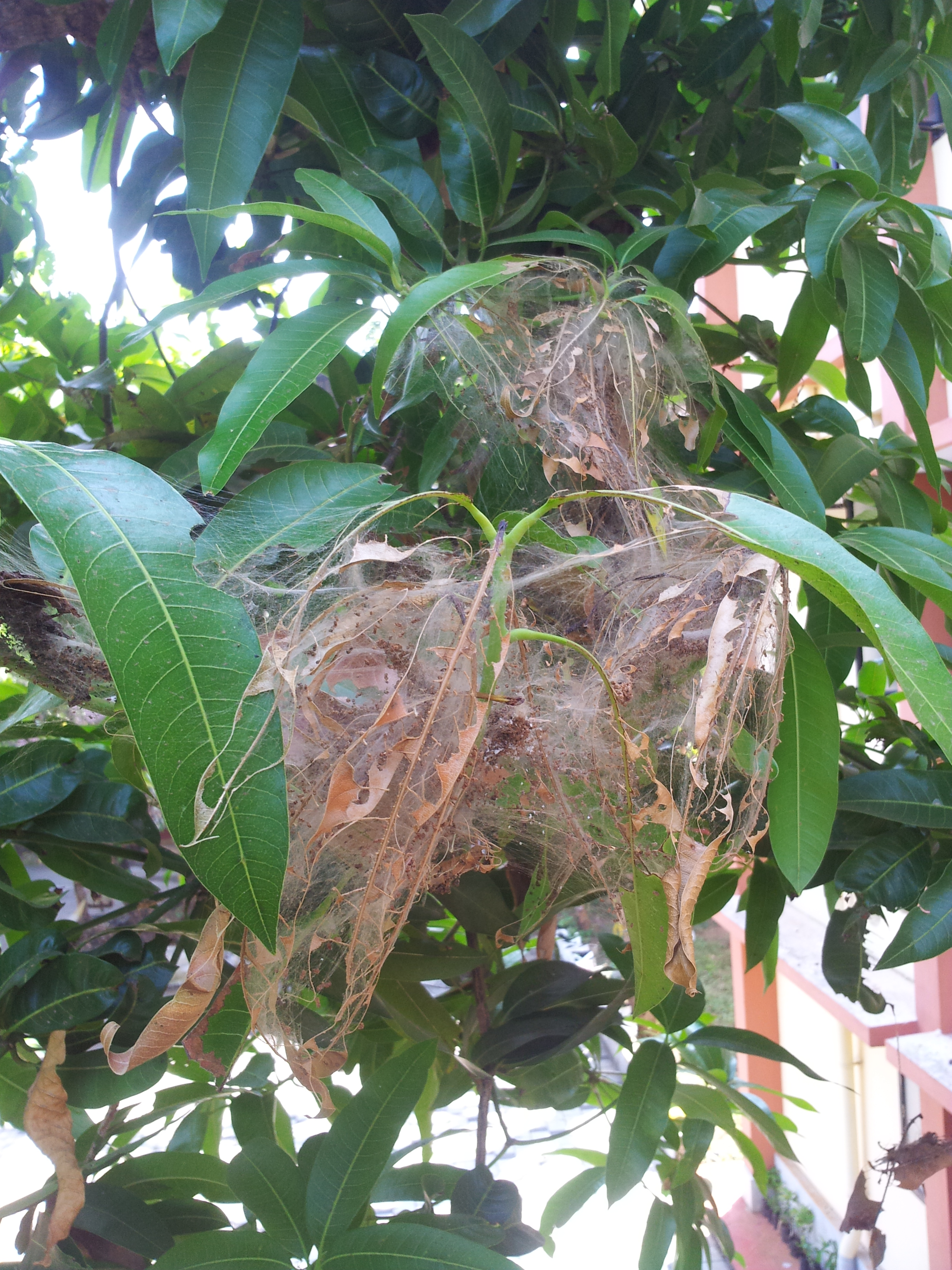 ഇലചുരുട്ടി പുഴു ആക്രമണം കാരണം ഉണങ്ങിയ ഇലകൾ